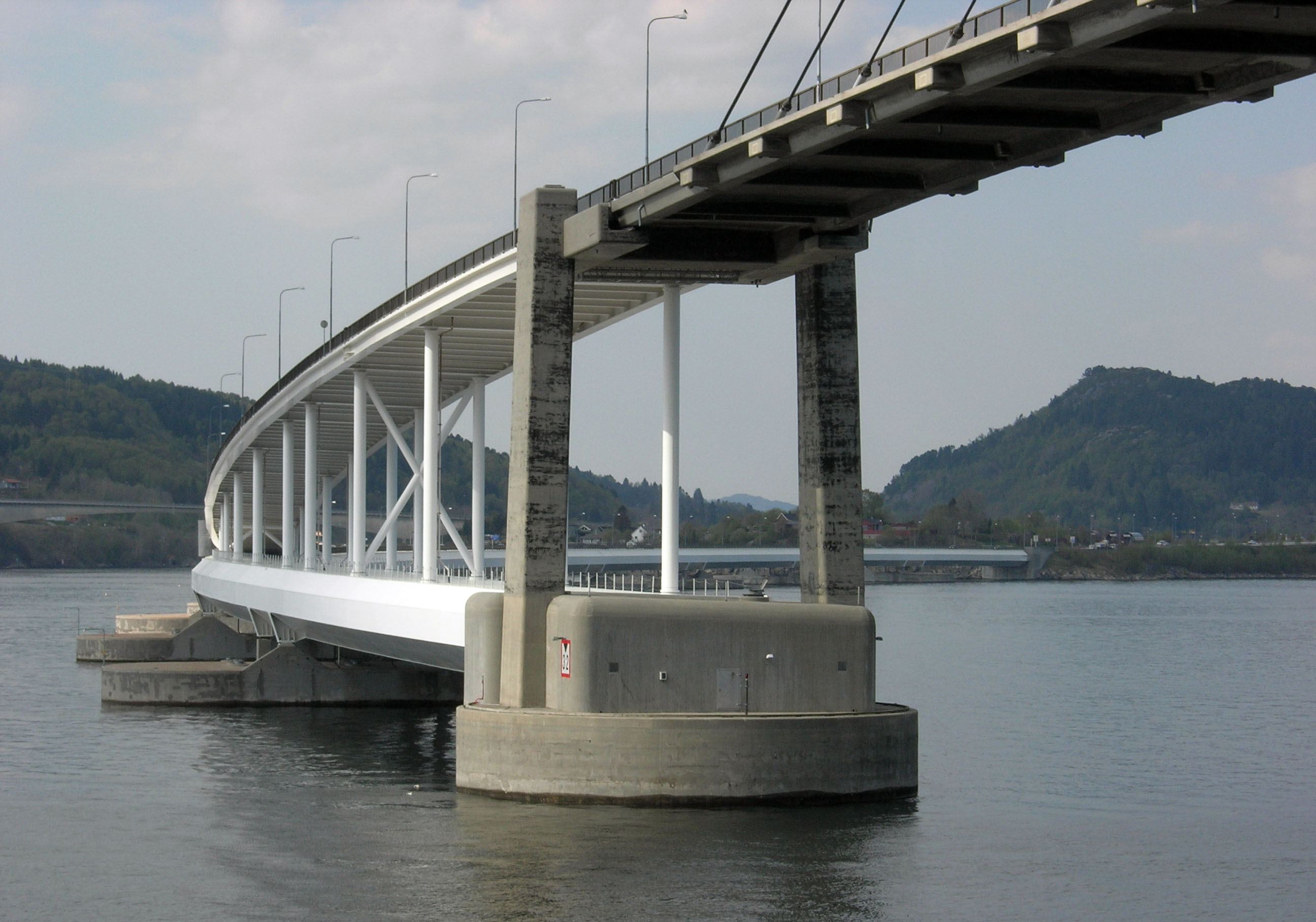 Nordhordlandsbroen